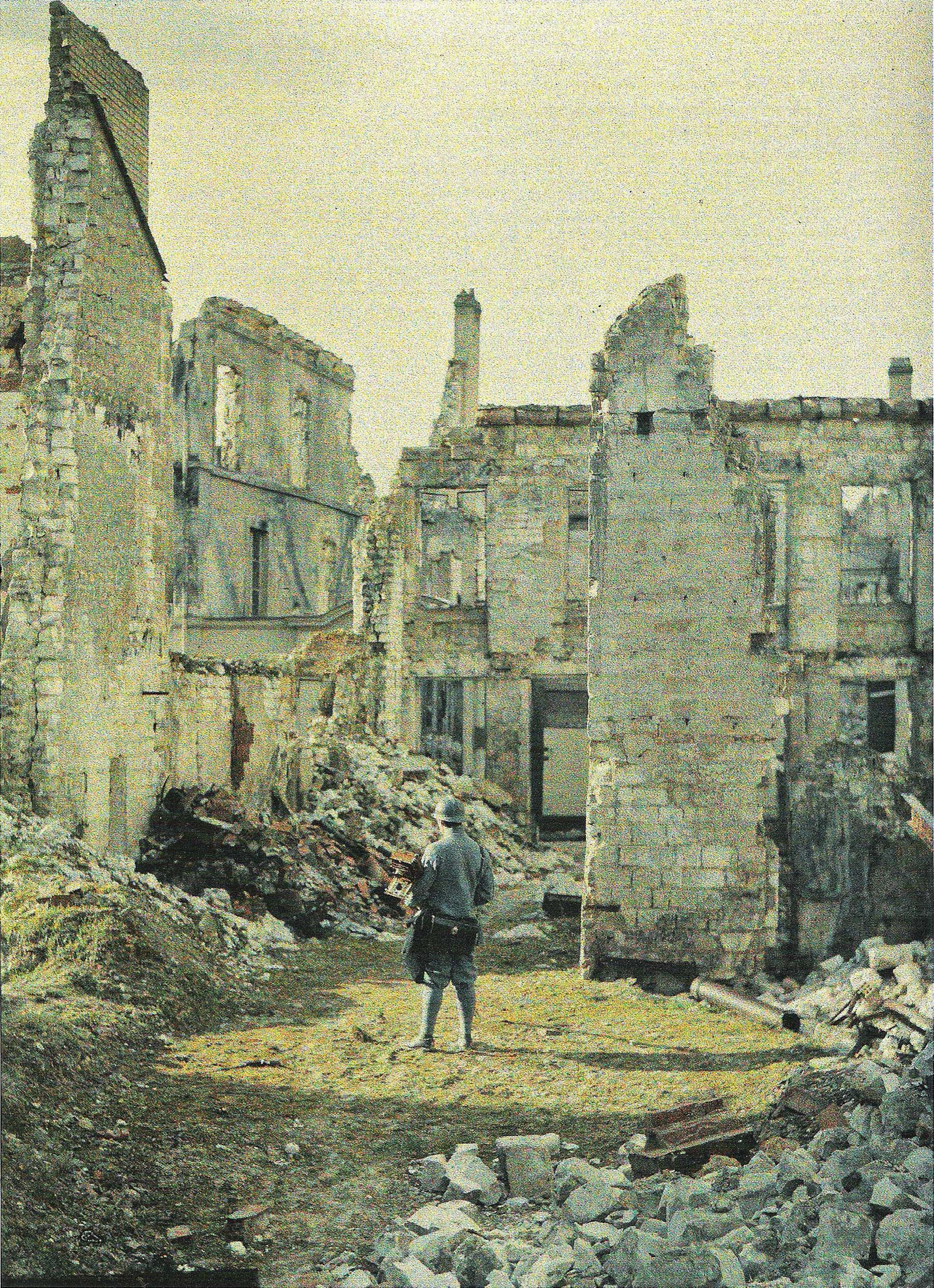 Autochrome de la Première Guerre mondiale, dans les ruines de l'usine Saint-Frère mars 1917 Reims. Titre : Ruines ; de dos, l'opérateur photographe. Photographie prise par Fernand Cuville à Reims montrant, de dos, son collègue Paul Castelnau [1]